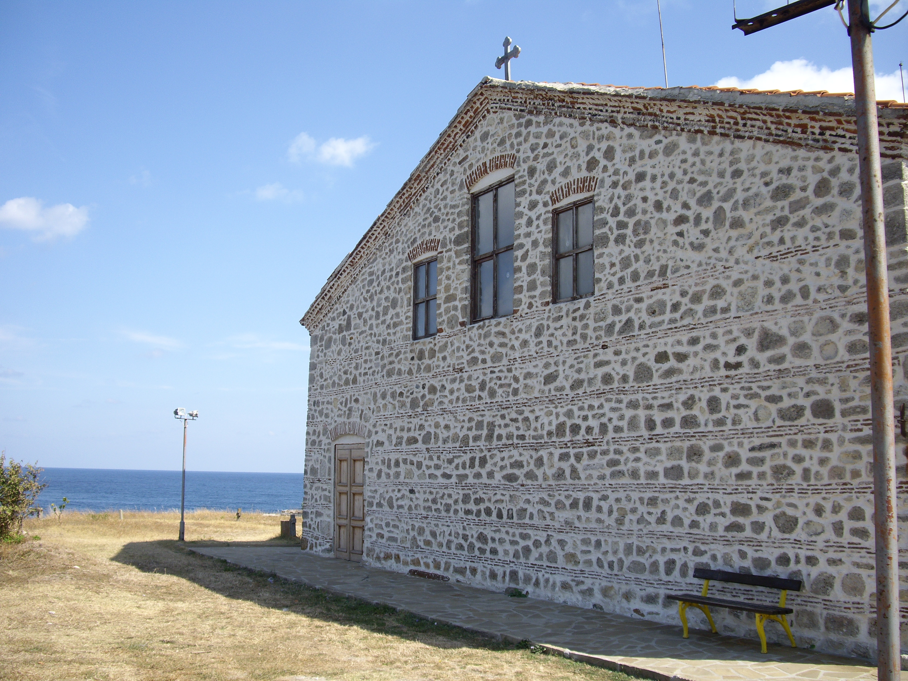 Странджа